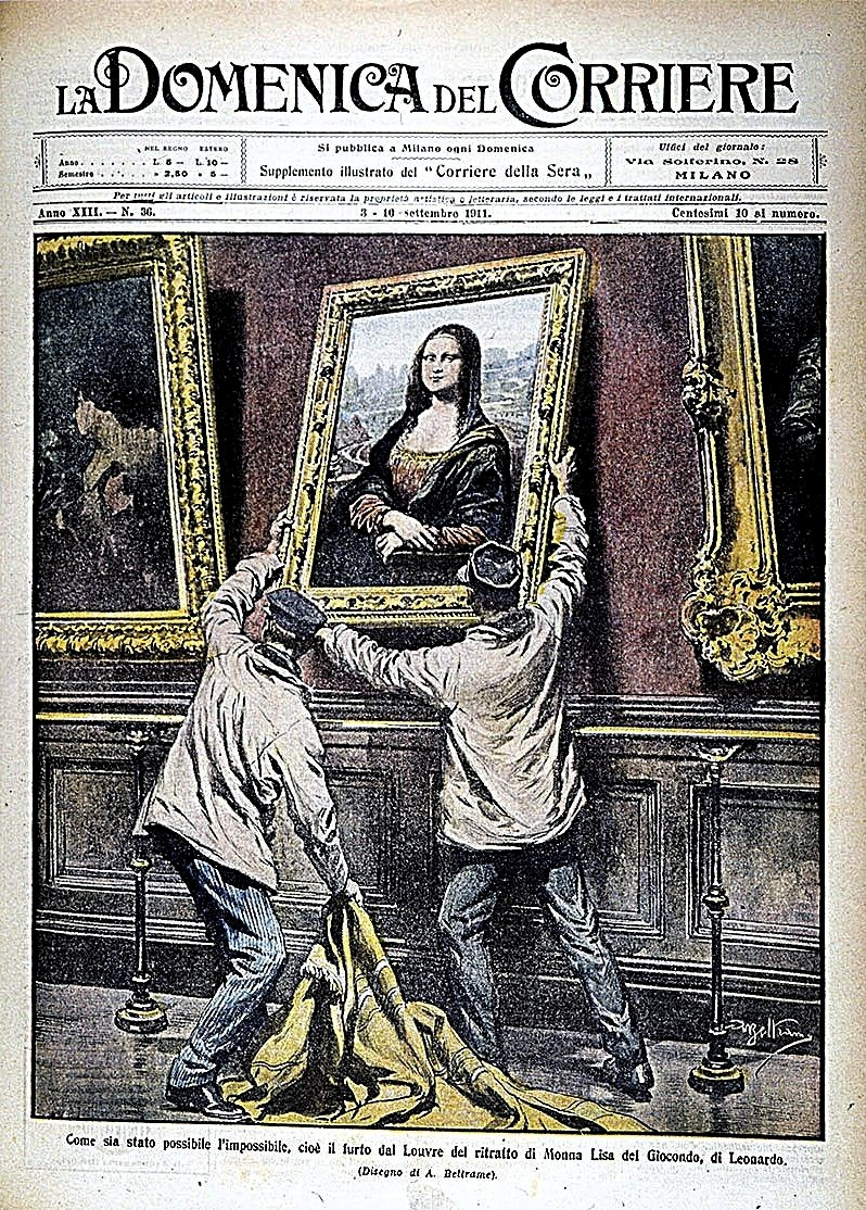 La Domenica del Corriere, № 36, 3-10 settembro 1911